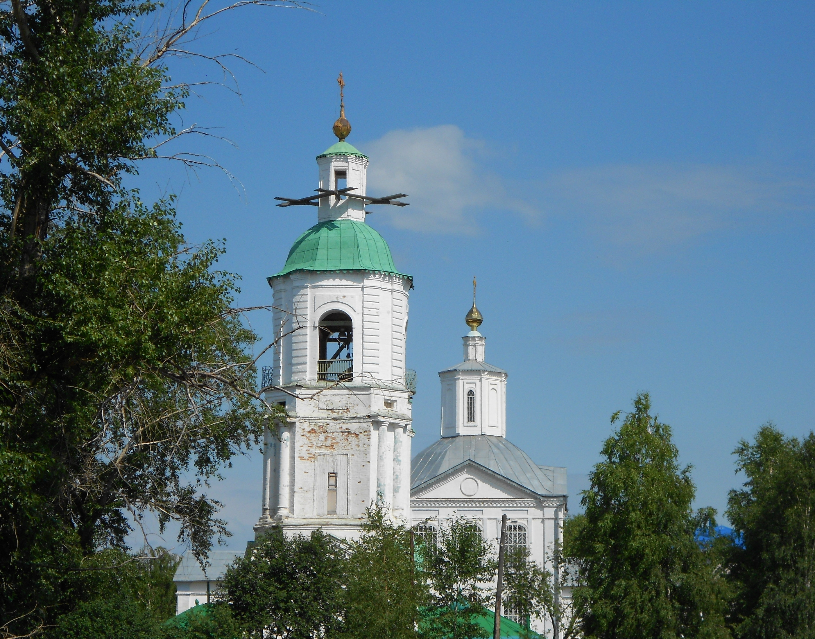 Церковь Стефановская (Архангельская область, Котлас, город Котлас)